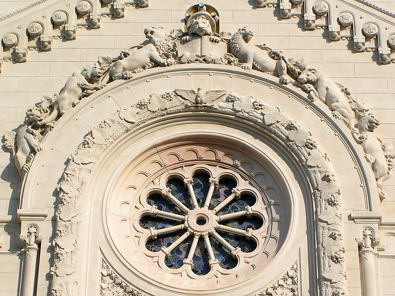 Reggio Calabria chatedral